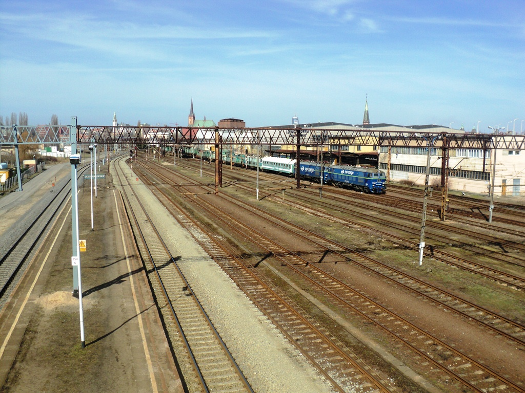 Stacja Szczecin Port Centralny-widok z kładki w kier. Szczecina Głównego